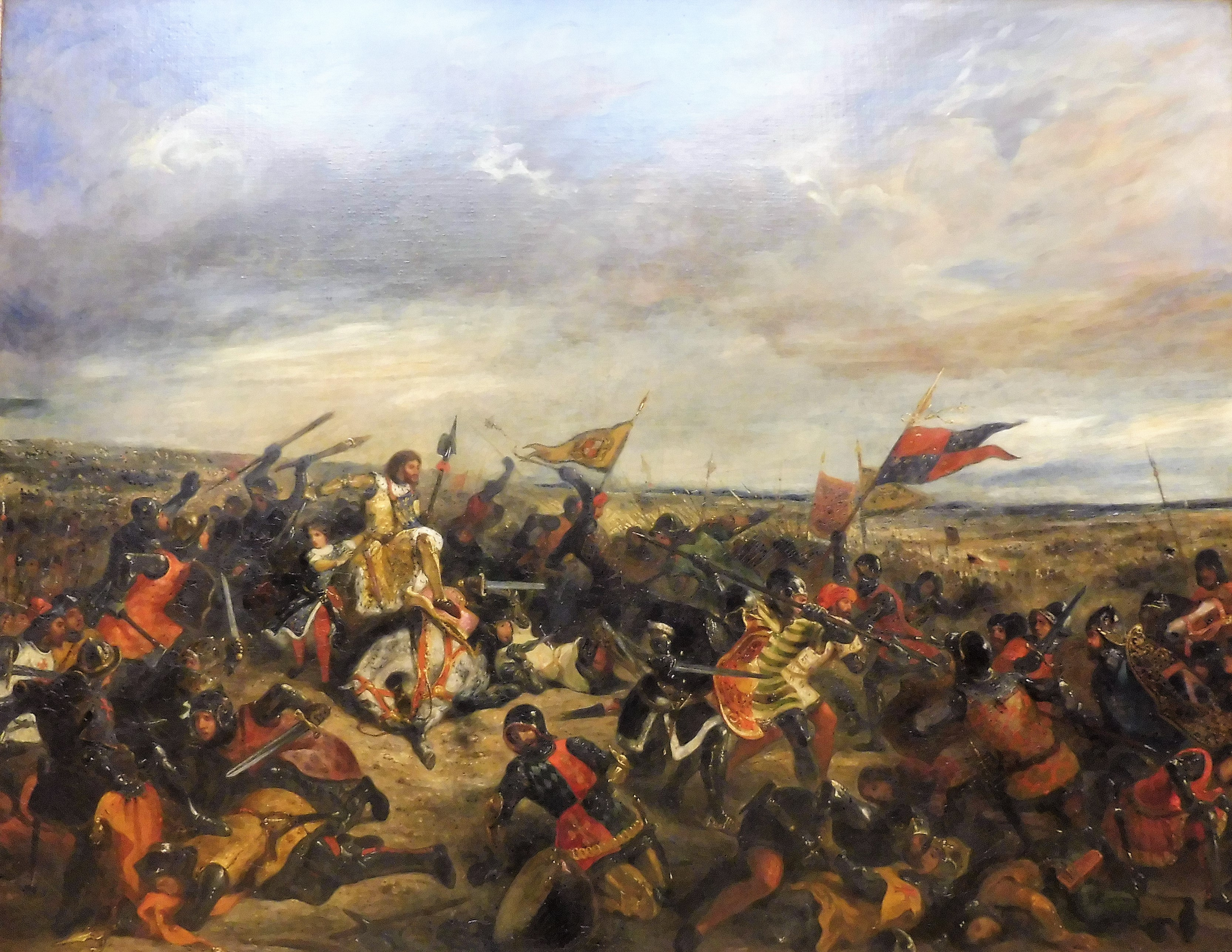 Vue du tableau de Delacroix "Bataille de Poitiers" ou "Le roi Jean à la bataille de Poitiers", huile sur toile réalisée en 1830 exposée au Musée du Louvre